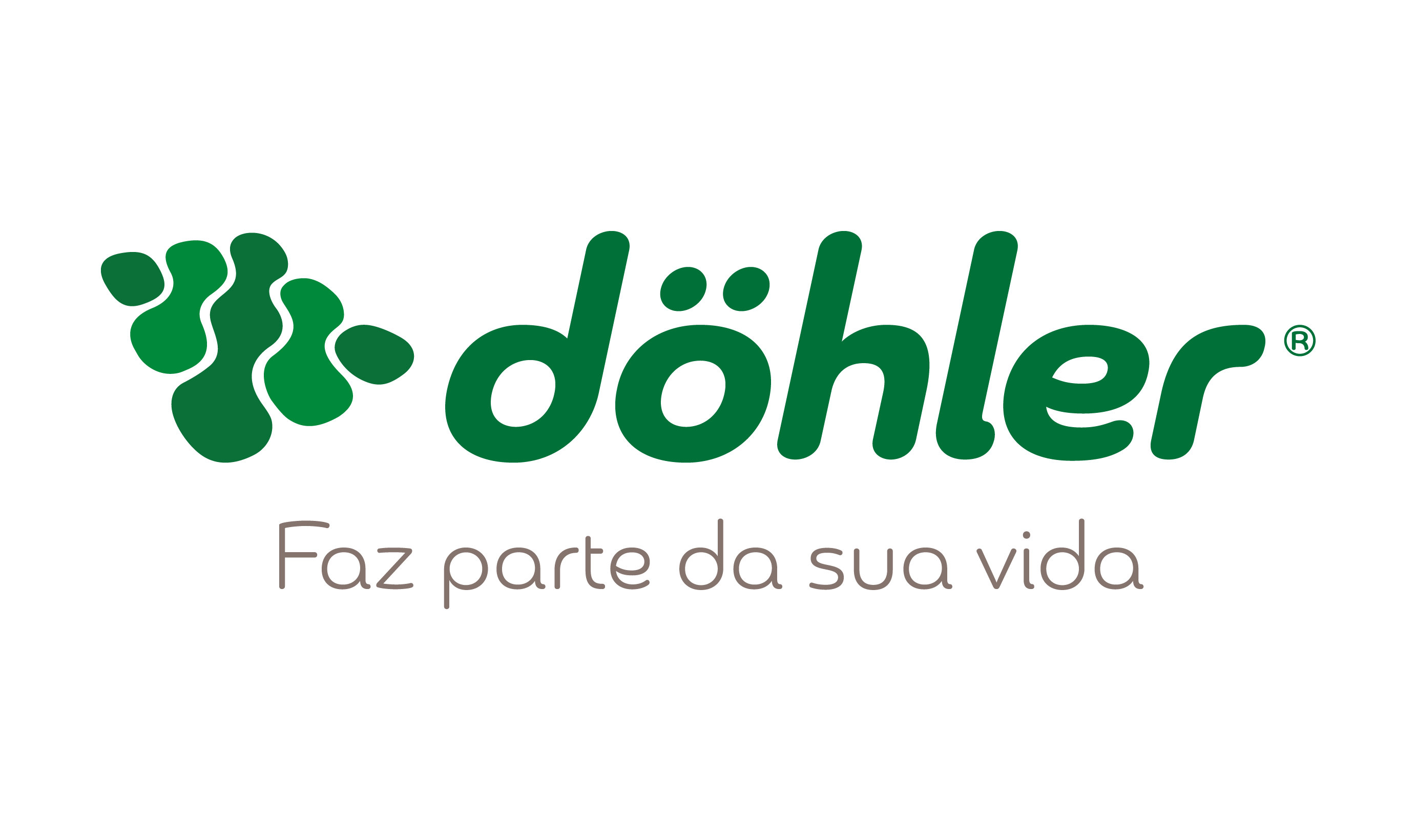 marca da empresa Döhler